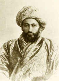 Сеид Мир Сиддик-хан (Хишмат), сын эмира Музаффара. Бухарский эмират.